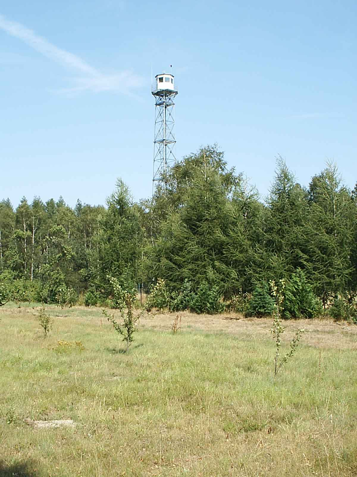 Wieża przeciwpożarowa w Niżankowicach